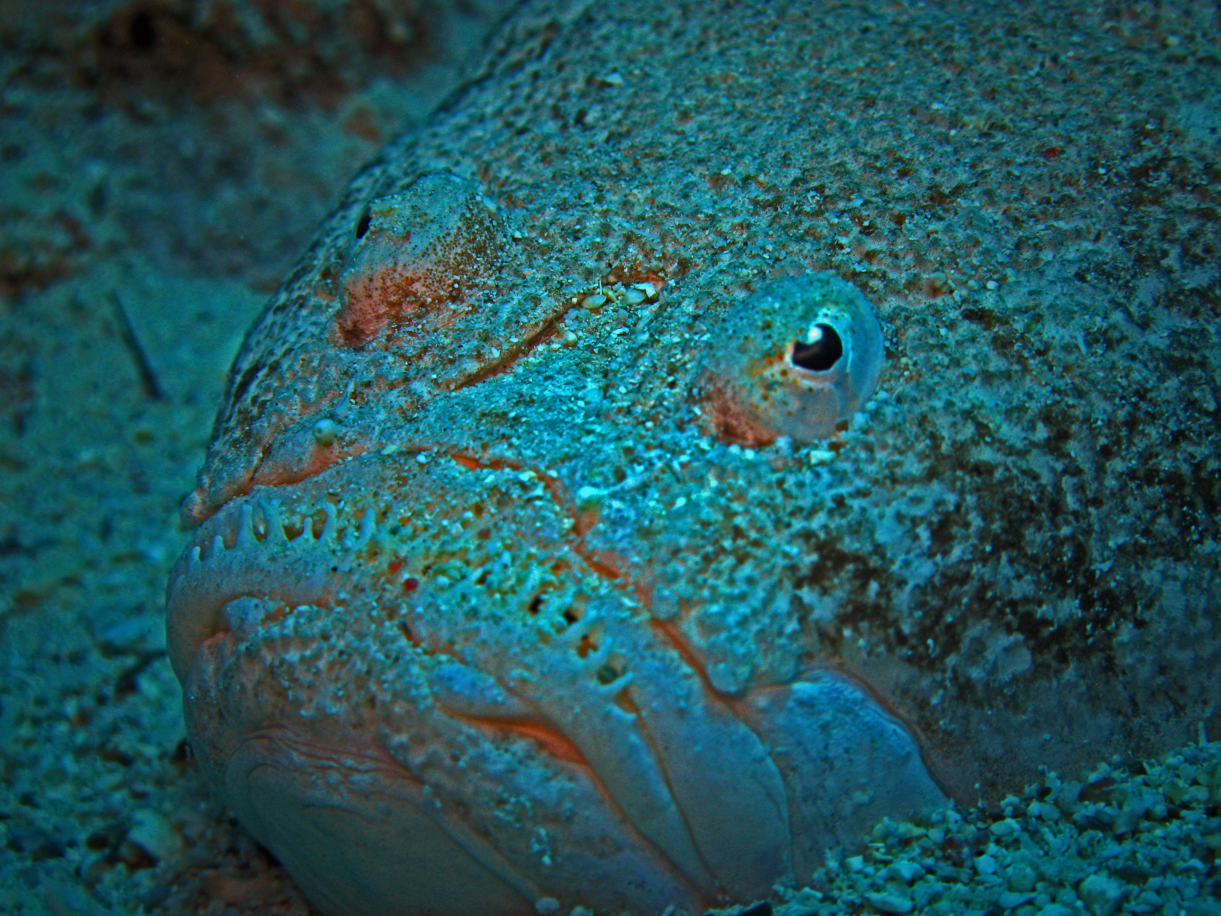 Dollfus' Stargazer - Uranoscopus dollfusi